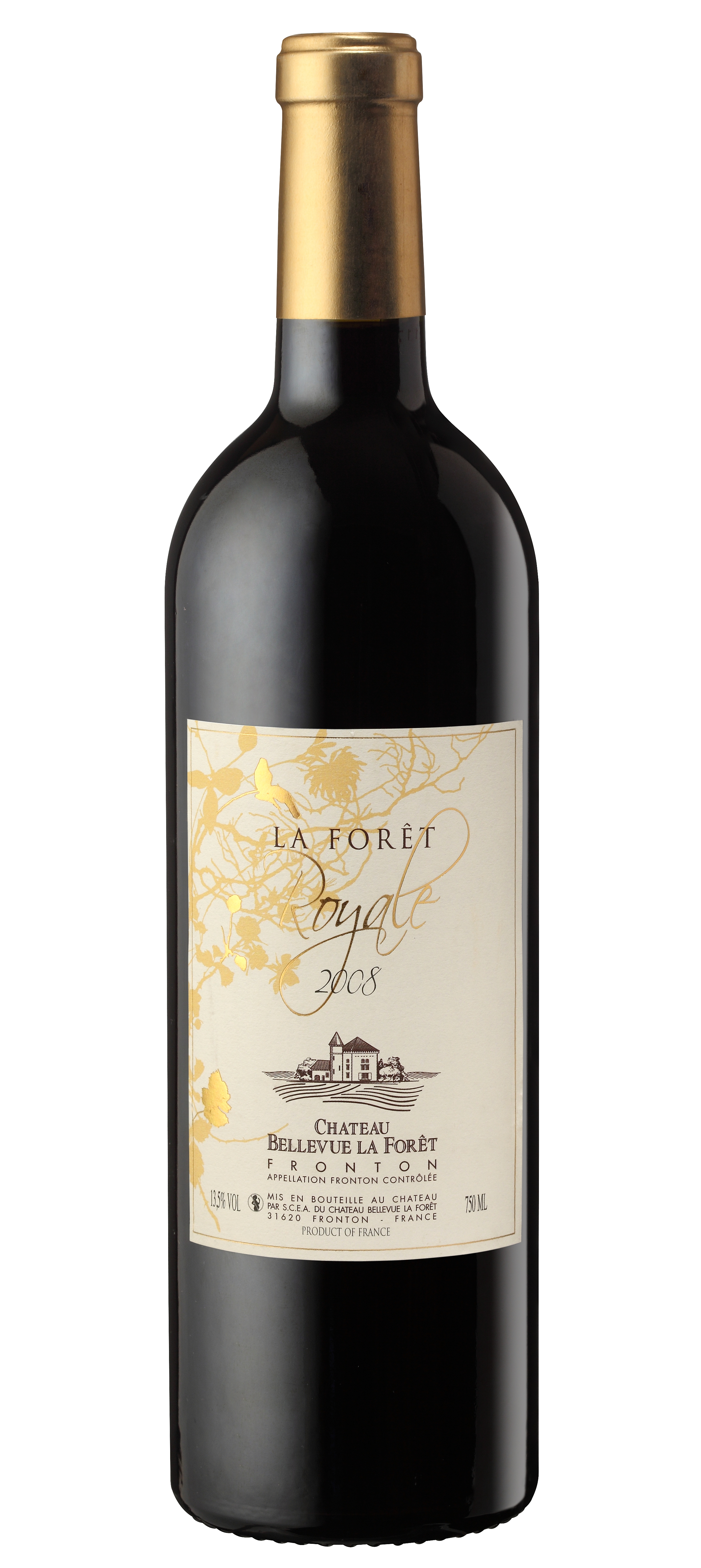 bouteille Bellevue la Forêt